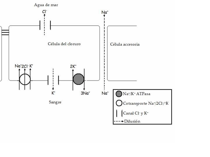 1.La bomba Na+/K+ transporta sodio al exterior de la célula y potasio al interior, creando un gradiente electroquímico que favorece la difusión de Na+ hacia el interior de la célula y de K+ hacia el exterior. 2. El cotransportador Na+/2Cl-/K+, usando el gradiente de concentración que favorece la difusión del Na+, introduce estos tres iones a las células epiteliales a través de la membrana basal. 3. El K+ difunde a través de canales en la membrana basal hacia el fluido extracelular. El Cl- difunde por el citoplasma hacia la membrana apical y se expulsa al agua de mar a través de un canal Cl- pasivamente a favor de su concentración y carga. 4. El Na+ difunde pasivamente al agua de mar a través de canales intercelulares a favor del gradiente eléctrico negativo.